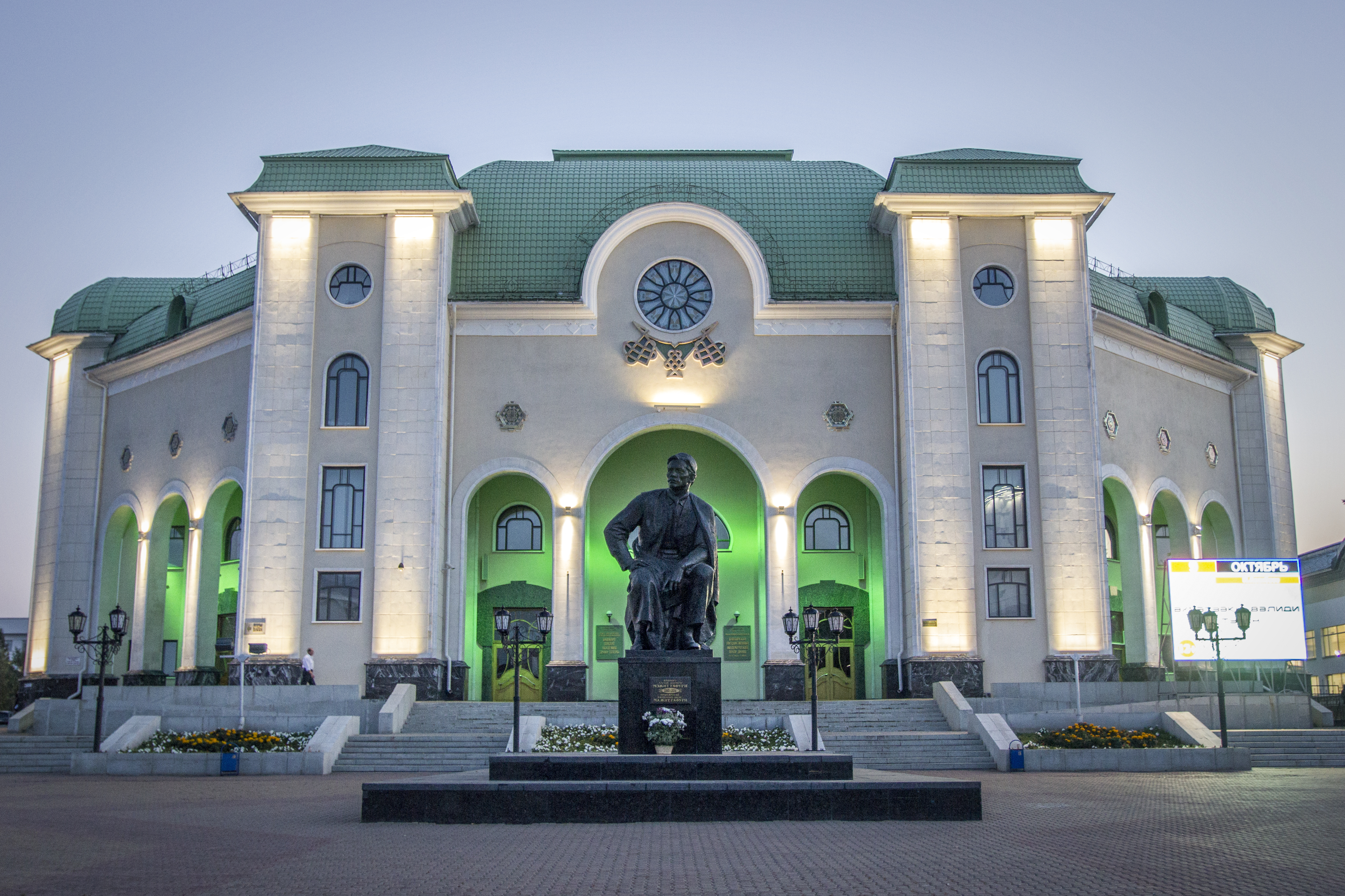 Здание башкирского академического театра драмы им. М.Г. Гафури: улица Заки Валиди, 34, Уфа, Башкортостан